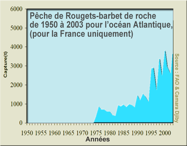 Statistiques de pêche par la flotte française de Rougets barbet de roche( de 1950 à 2003 pour l’océan Atlantique) D'après données FAO, utilisées dans un travail de Camara Djiby intitulé" Evaluation préliminaire de stock de rouget barbet de roche (Mullus surmuletus) en Manche-sud mer du Nord" (Mémoire de fin d’études Pour l’obtention du Master Sciences Agronomiques et Agroalimentaires Spécialité Sciences Halieutiques et Aquacoles), soutenu 2009-11-10